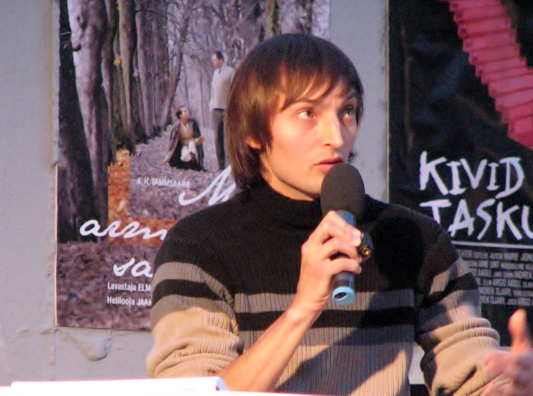 Paavo Piik Tallinna Linnateatri 48. hooaja avamisel